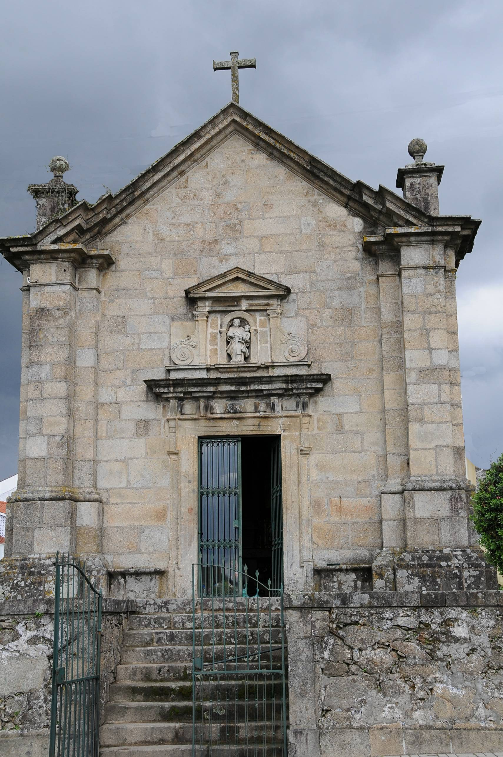 Senhora do Carmo Chapel in Sao Paio de Merelim, Braga, Portugal